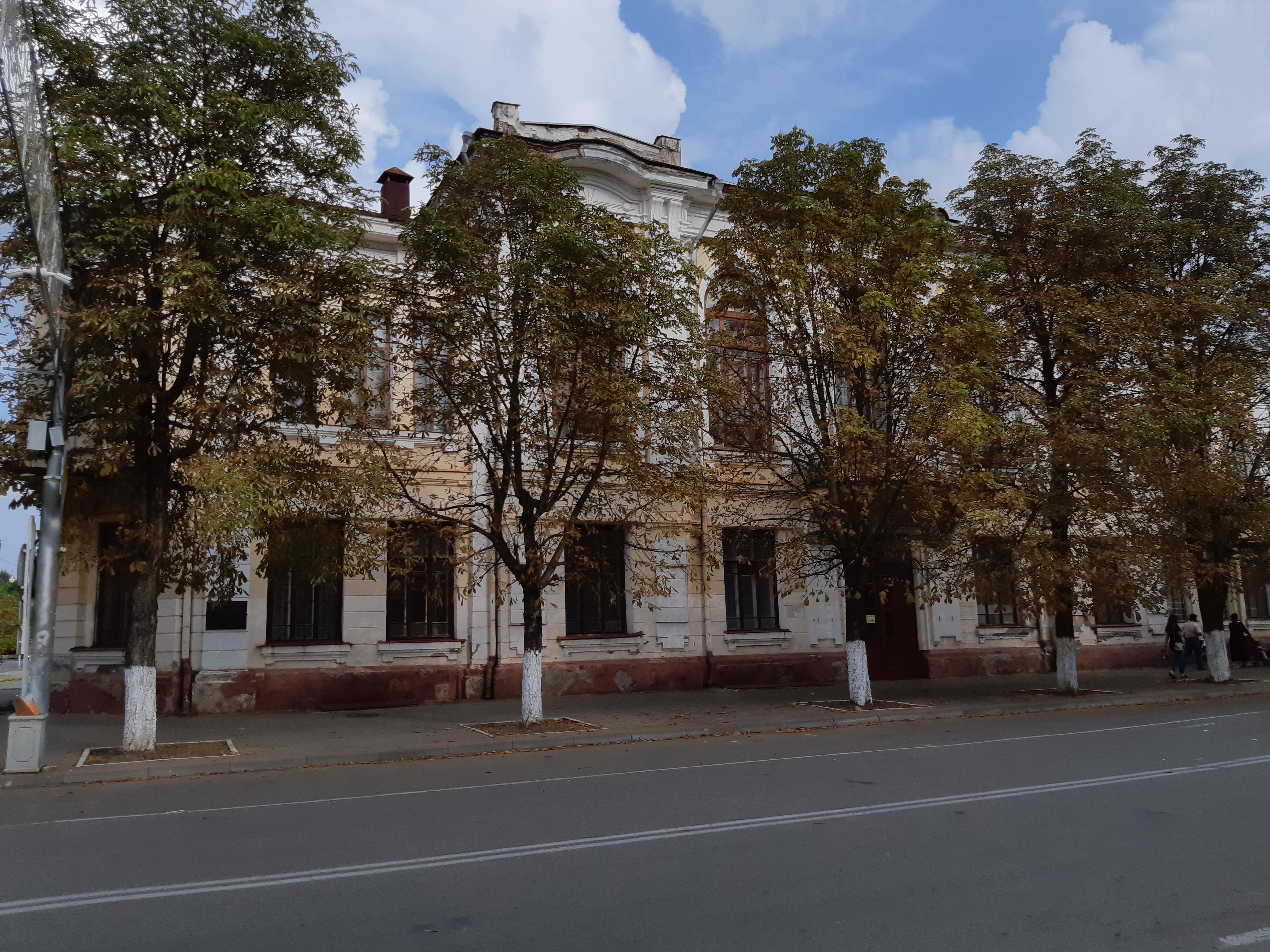 Здание, где работал городской совет рабочих, крестьянских и солдатских депутатов: улица Краснооктябрьская, 14, Майкоп, Адыгея